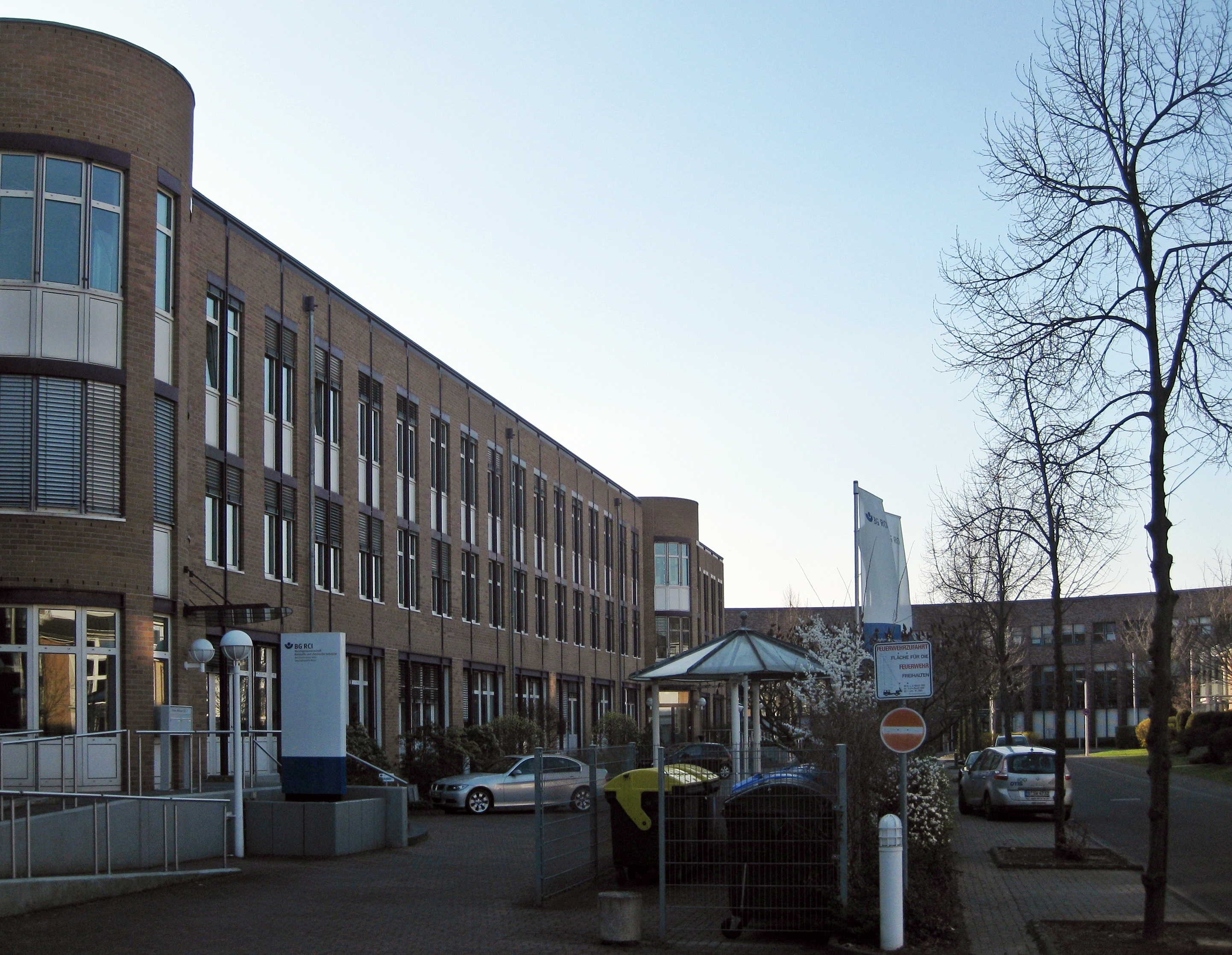 Deutschland, Bonn: Berufsgenossenschaft Rohstoffe und chemische Industrie (BG RCI), Bezirksdirektion Köln - Geschäftsstelle Bonn